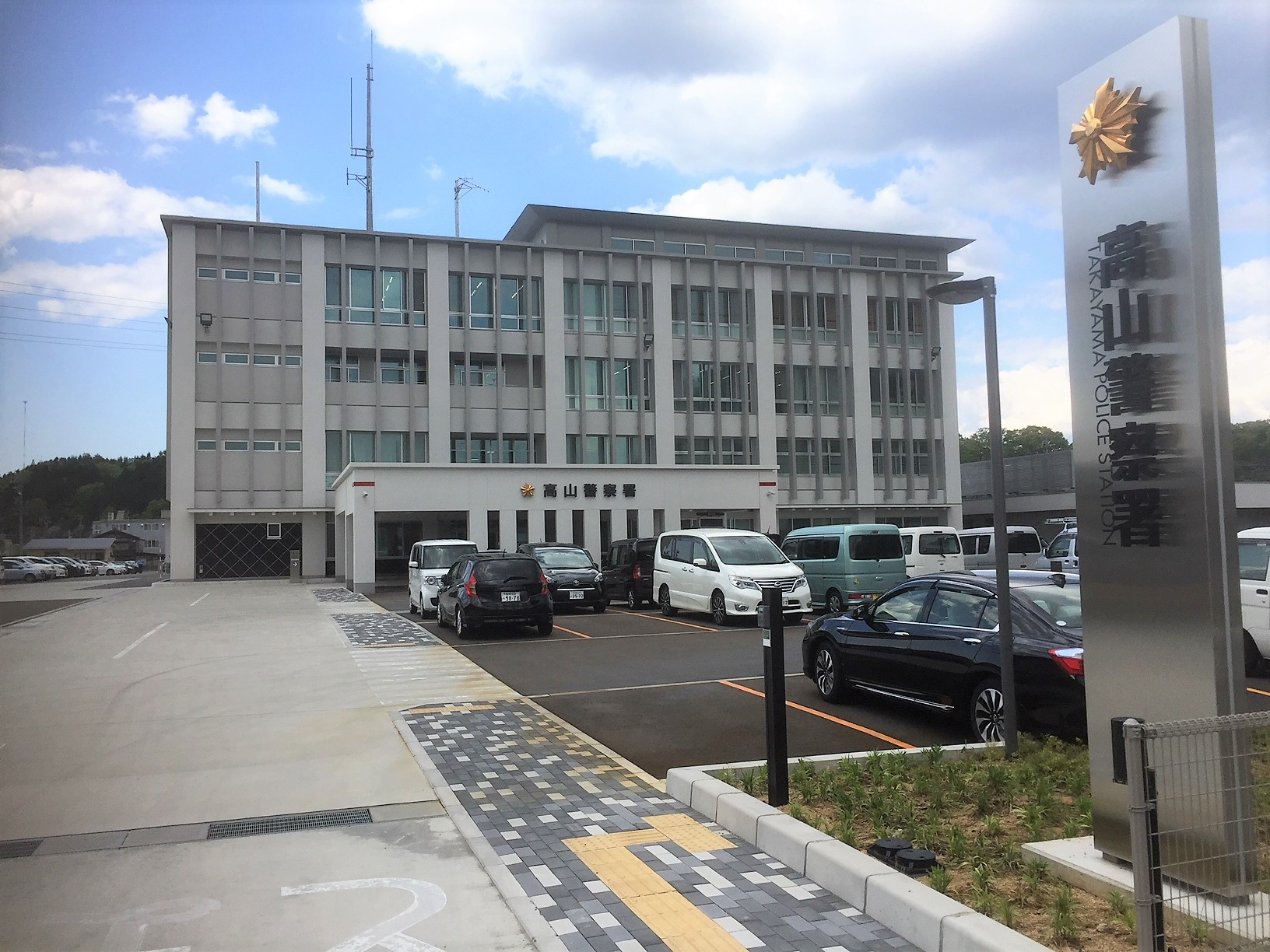 岐阜県高山市大新町5丁目68番地1 高山警察署